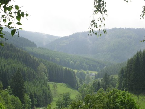 Blick ins Sauerland, Mittelgebirgslandschaft